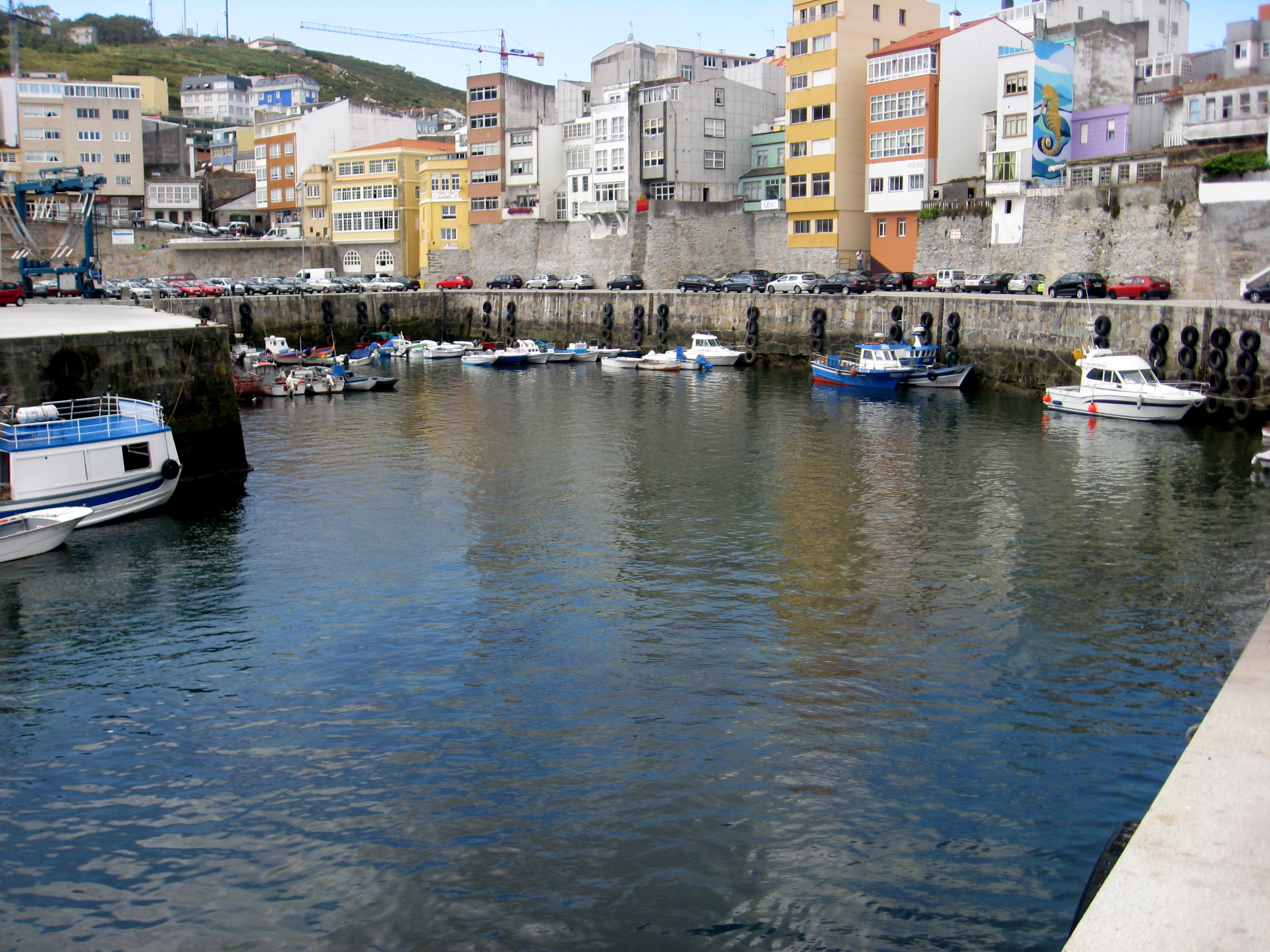 Dársena del puerto de Malpica, A Courña, Galiza, Spain